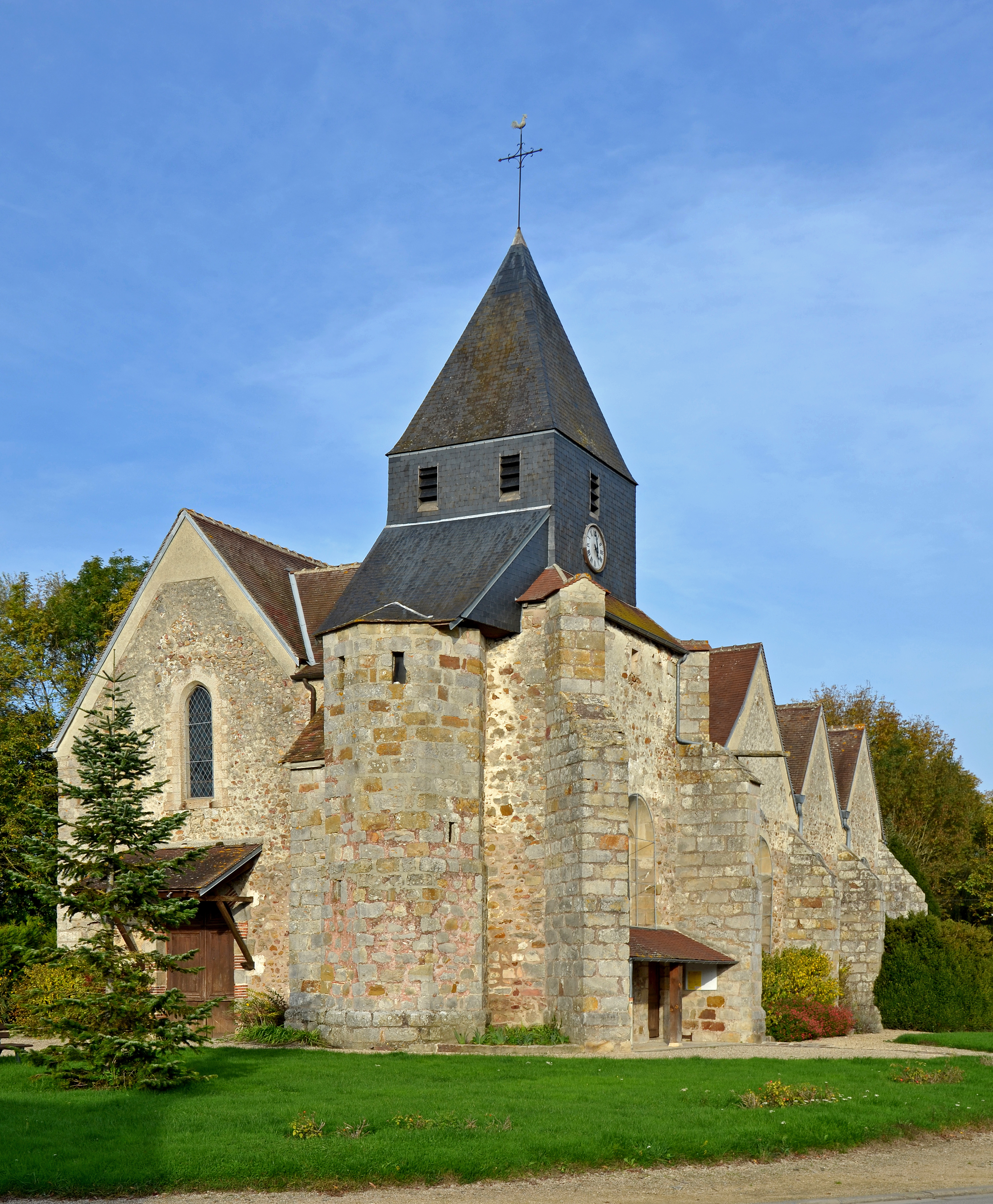 Église Saint-Aignan de Villiers-sur-Seine. (Seine-et-Marne, Ile de France)